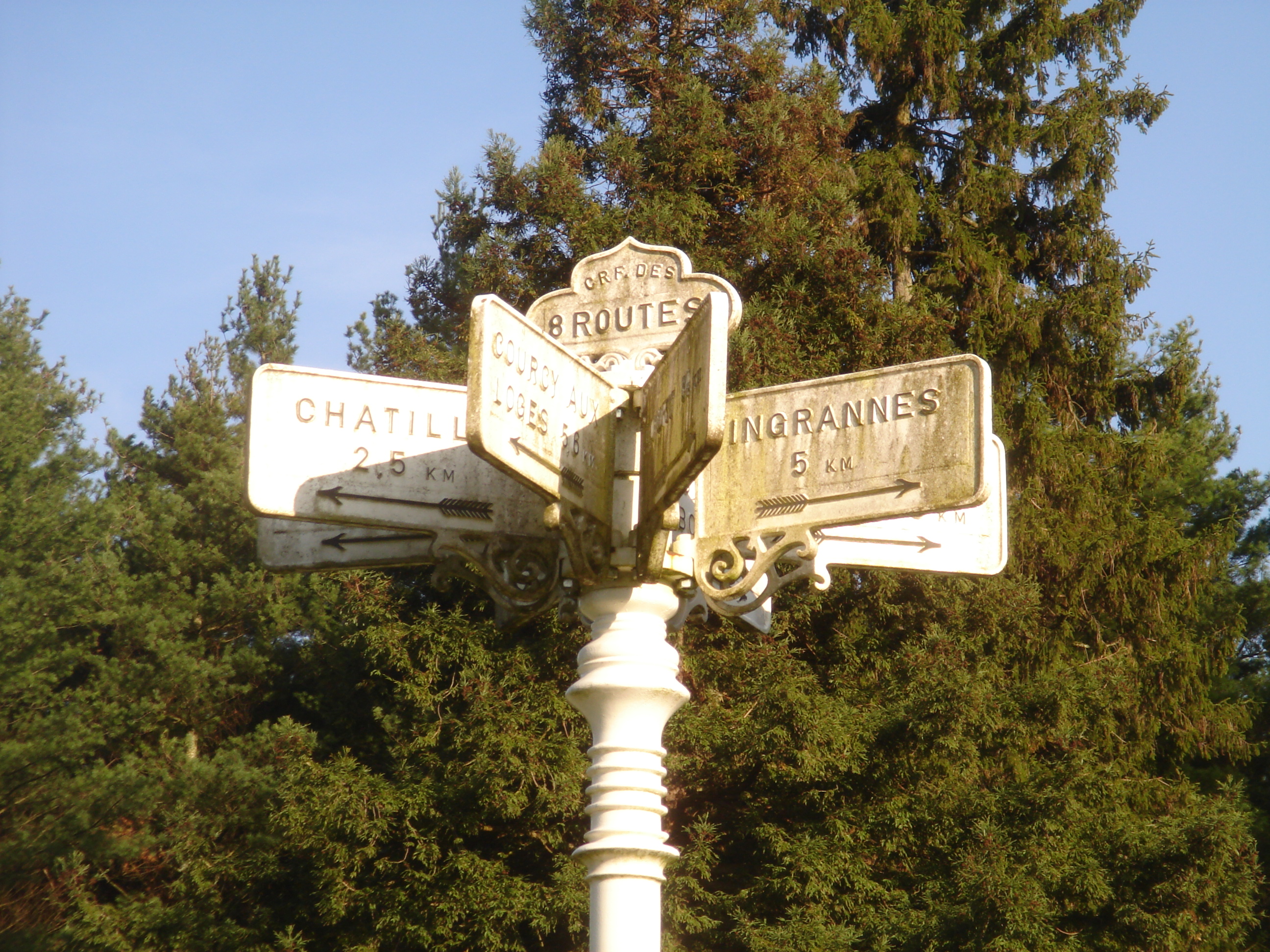 Panneau situé au centre du carrefour des huit routes à Chambon-la-Forêt dans la forêt d'Orléans, Loiret, Centre, France